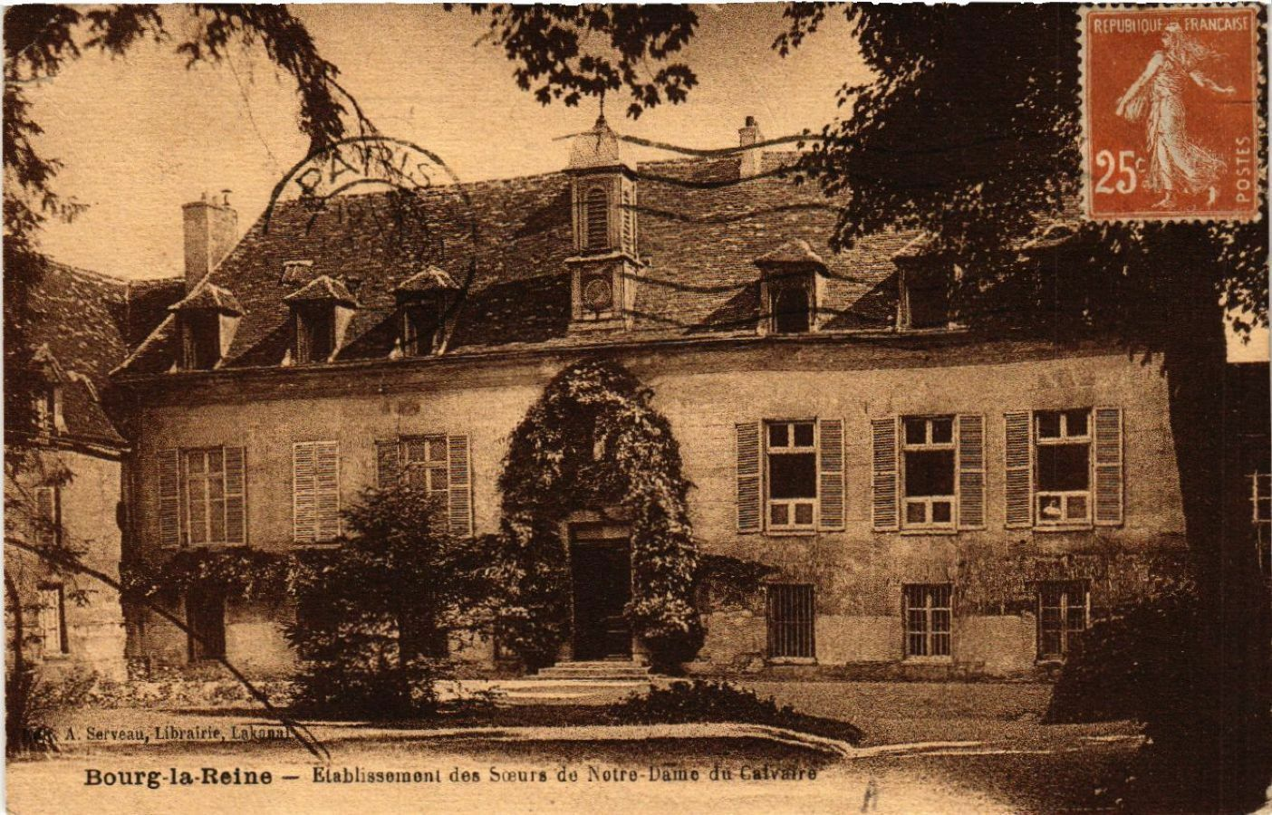 Maison des Sœurs de ND du Calvaire au début du XXe siècle à Bourg-la-Reine.